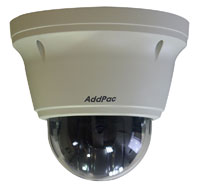 Купольная IP видеокамера AddPac AP-IPC250M